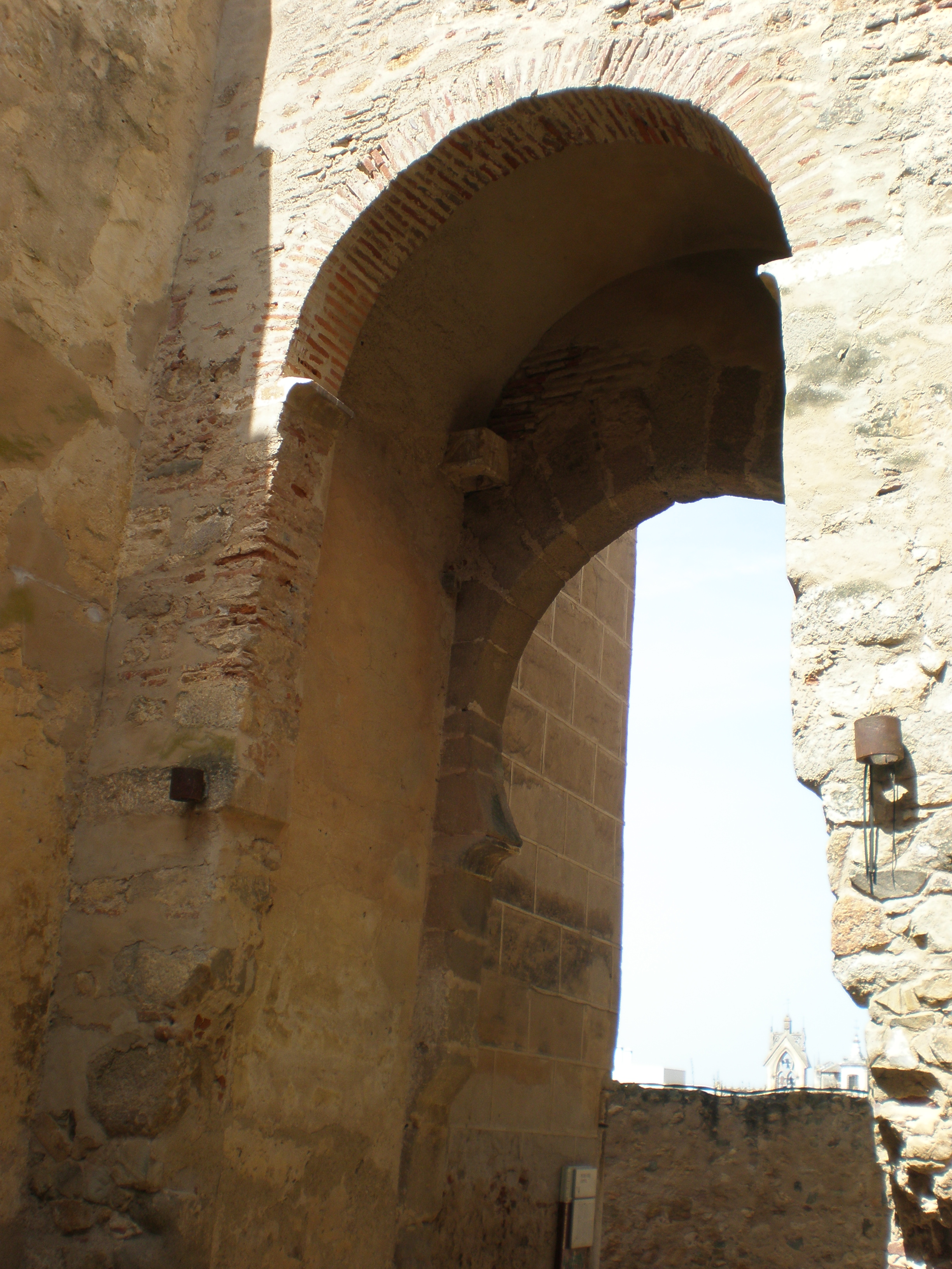 Alcazaba de Badajoz, Extremadura, Spain